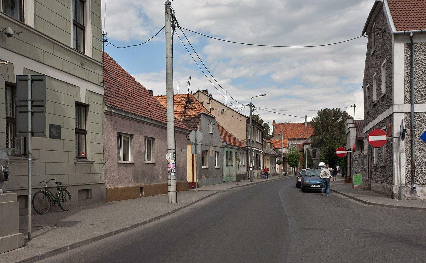 Zabudowa jednej z uliczek dochodzących do rynku, z lewej skraj ratusza.